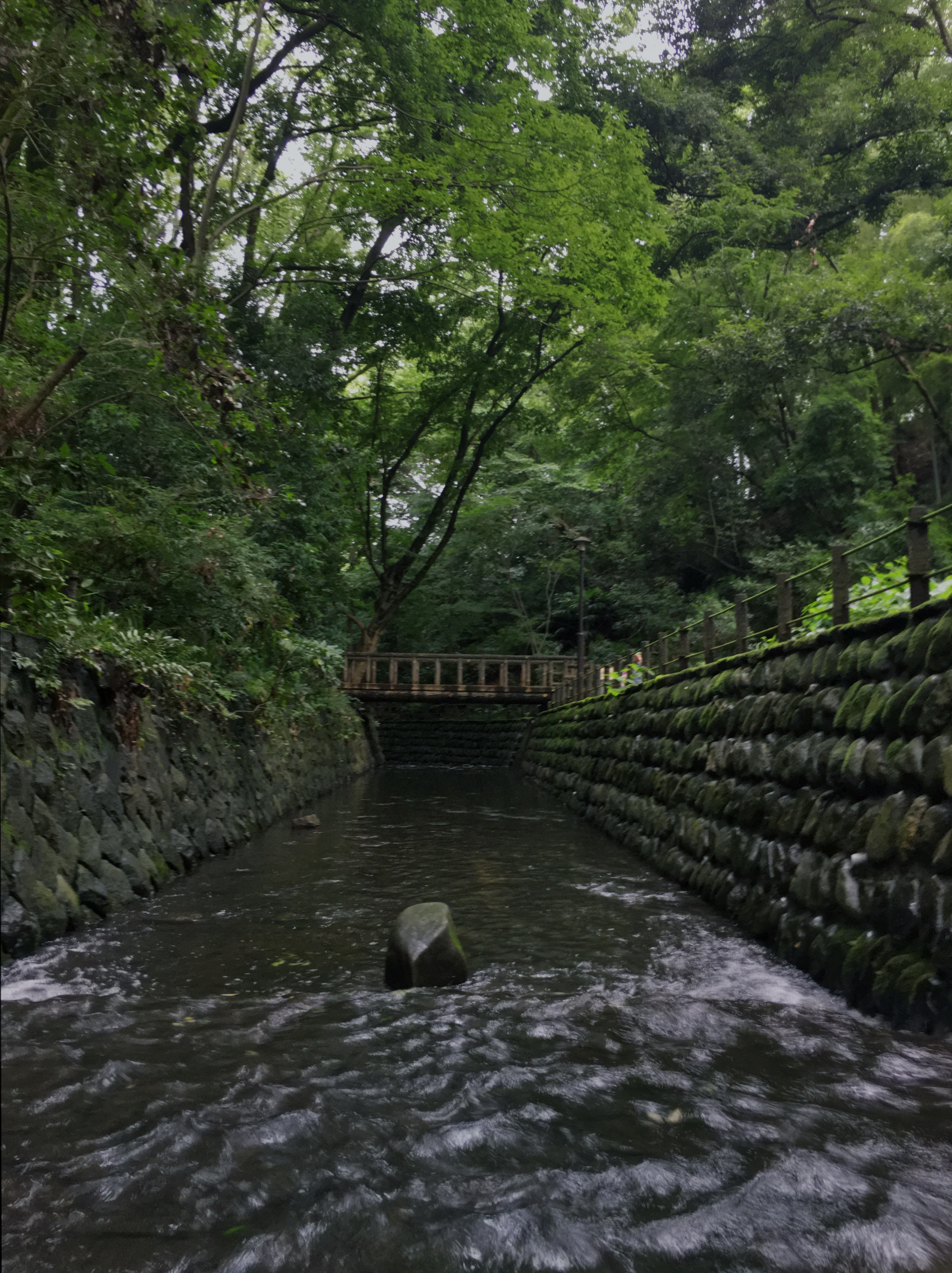 Todoroki Keikoku (等々力渓谷)